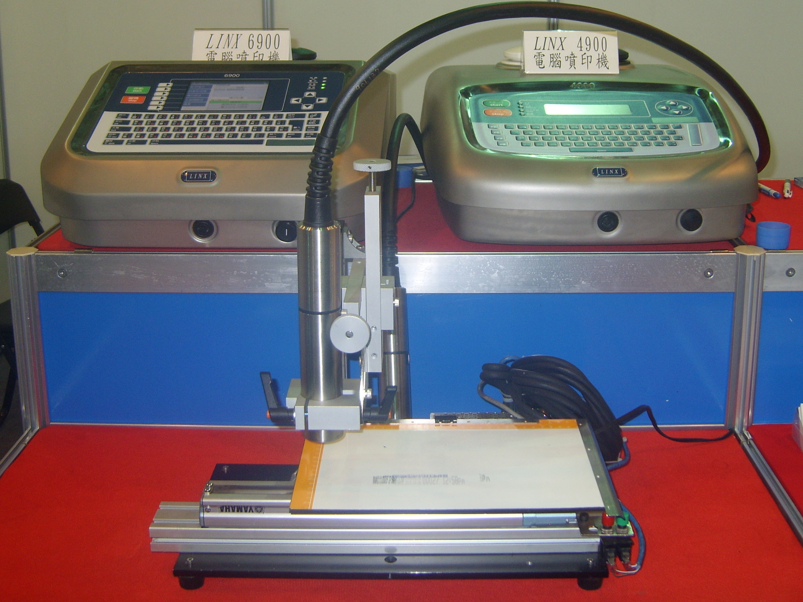 2008 Taipei Pack: Linx Barcode Printer.